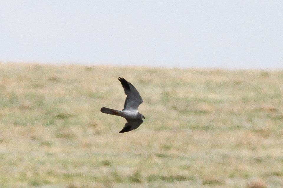 Pallid Harrier (Circus macrourus), adult male